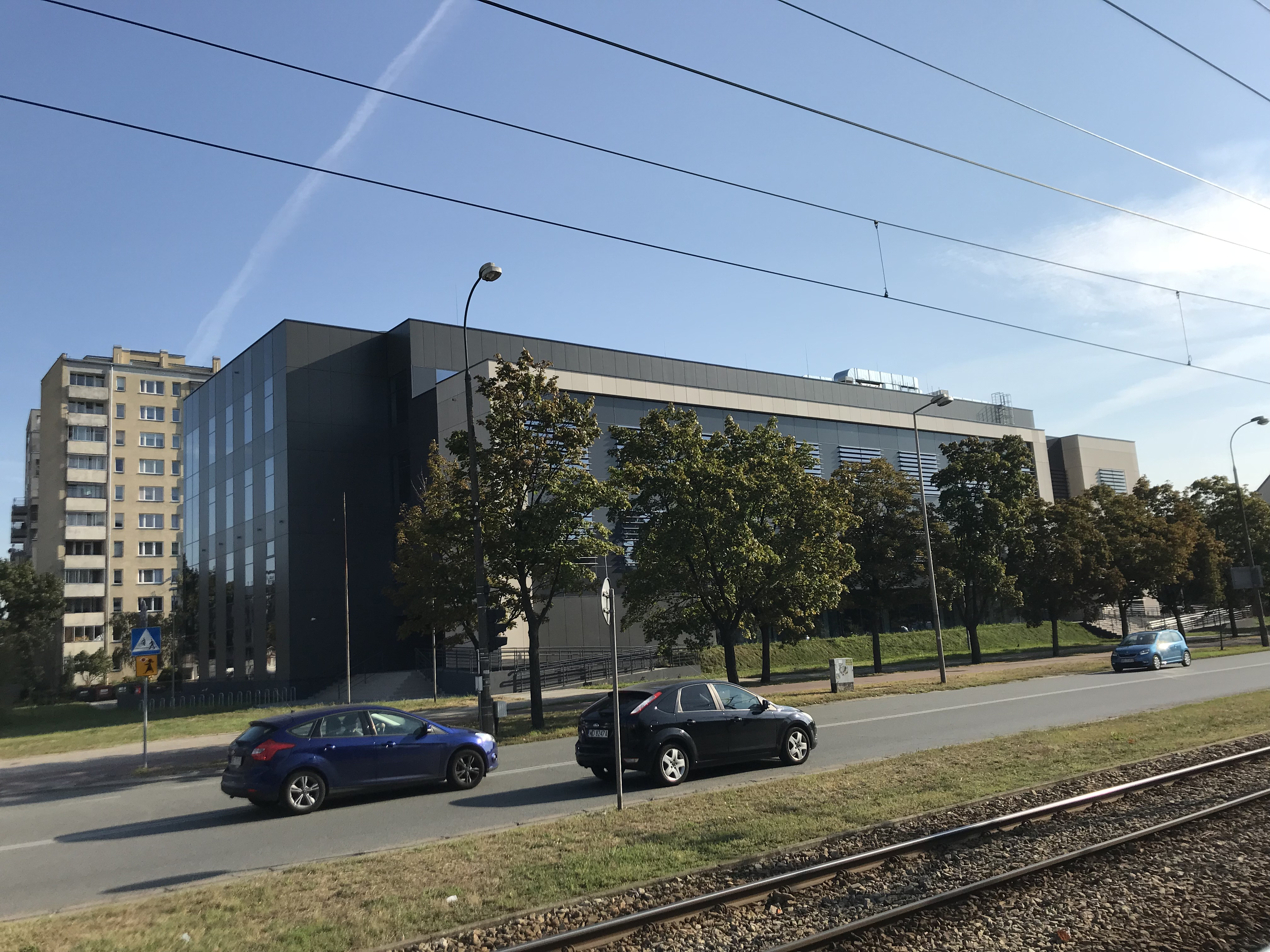 Building of Christian Theological Academy in Warsaw in September 2018